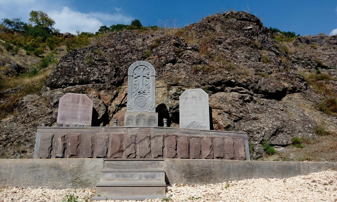 Ներքին Խոտանանի հիմնադիրների հիշատակին և գյուղում ծնված հայ ռազմական գործիչ, գեներալ-լեյտենանտ Մուրազ Սարգսյանին նվիրված հուշարձանախումբ